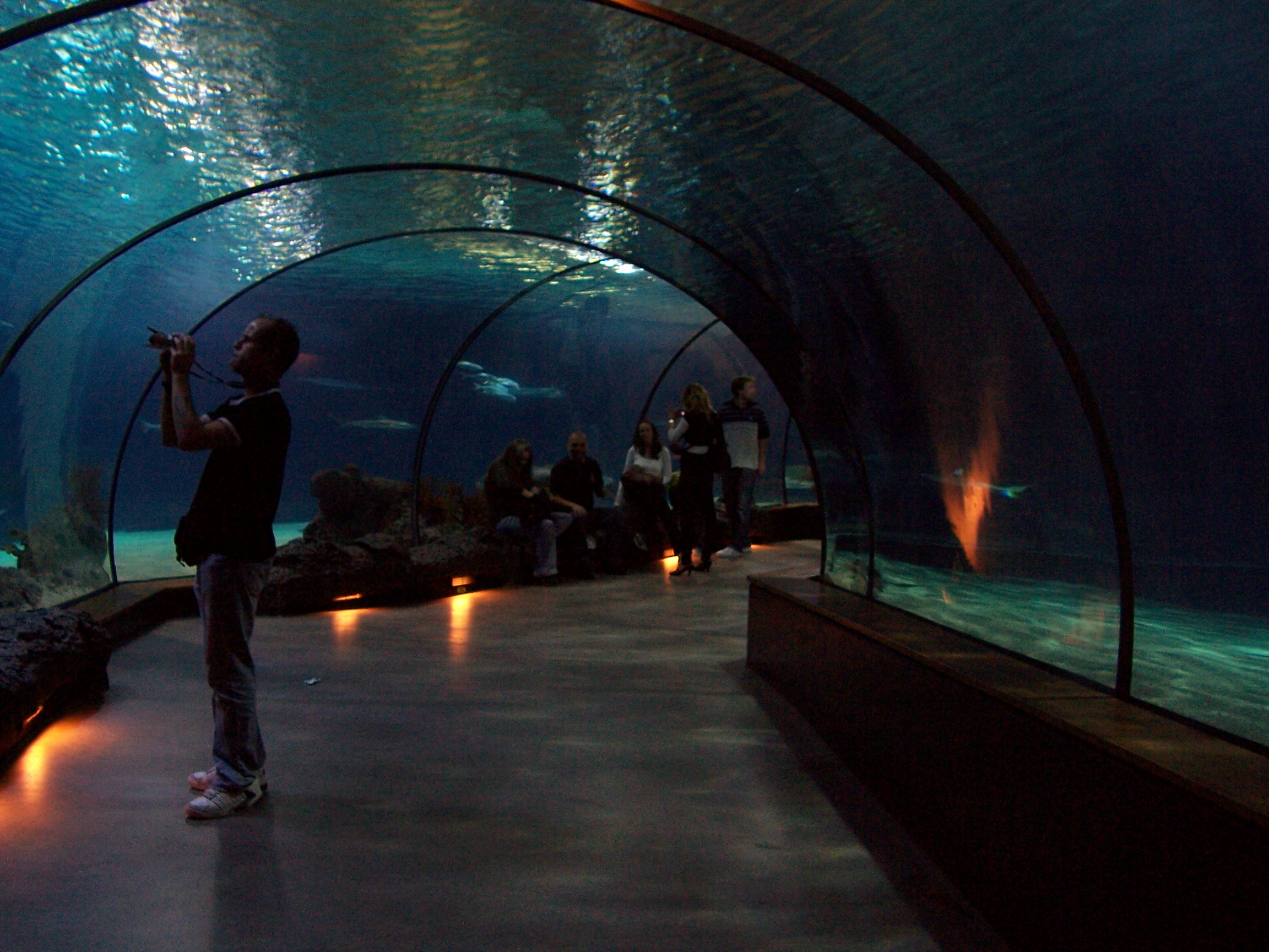 Het Oceanium. Oceanium.